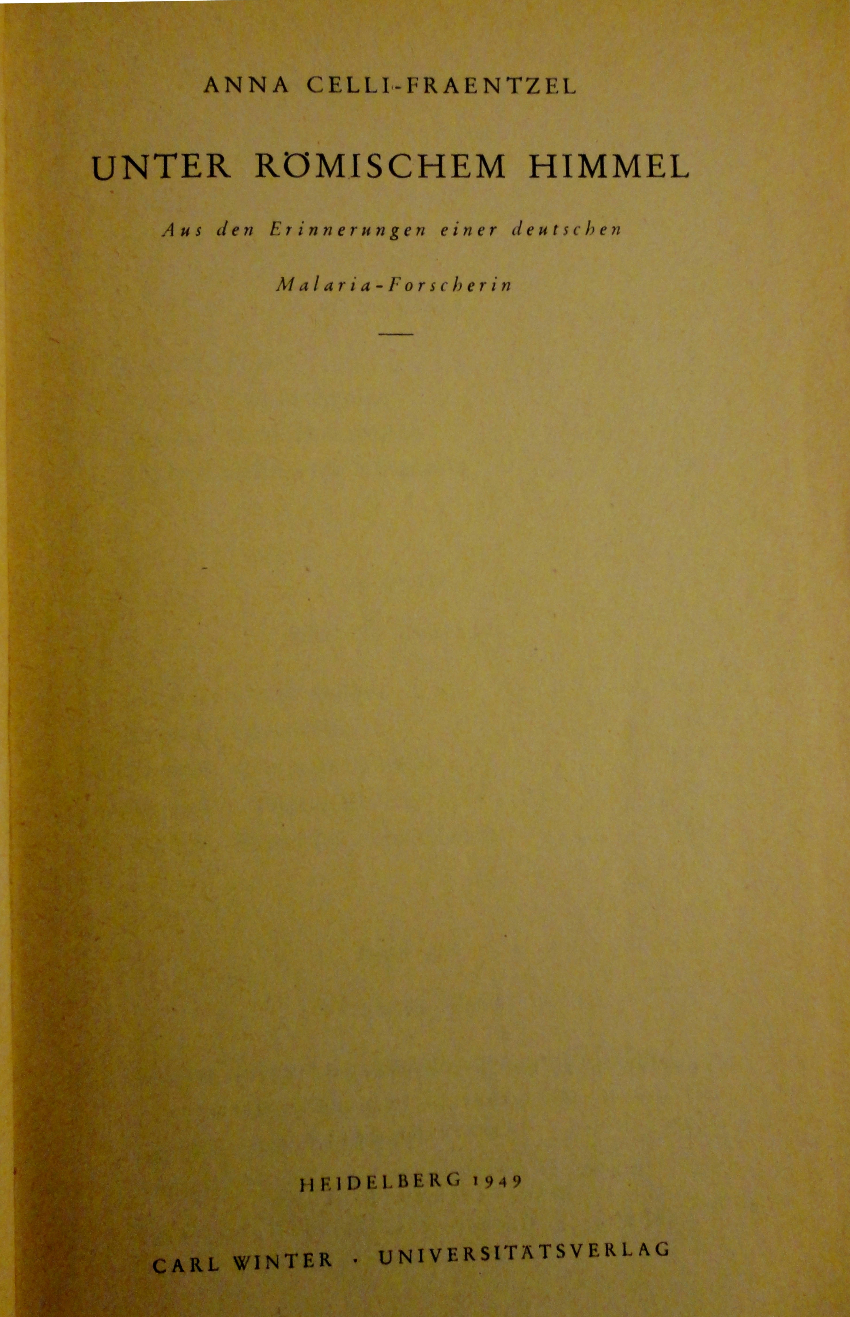 Frontespizio dell'omonimo libro di Anna Fraentzel Celli pubblicato nel 1949